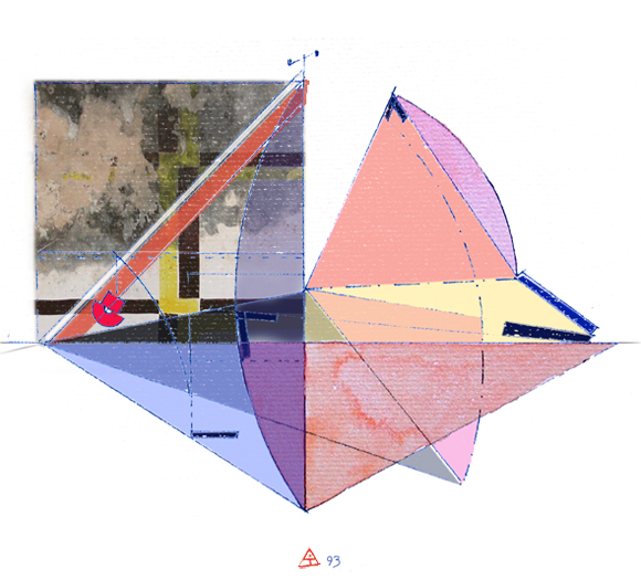 Aquarelle et infographie